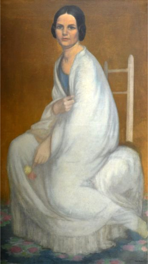 Femme au drapé blanc